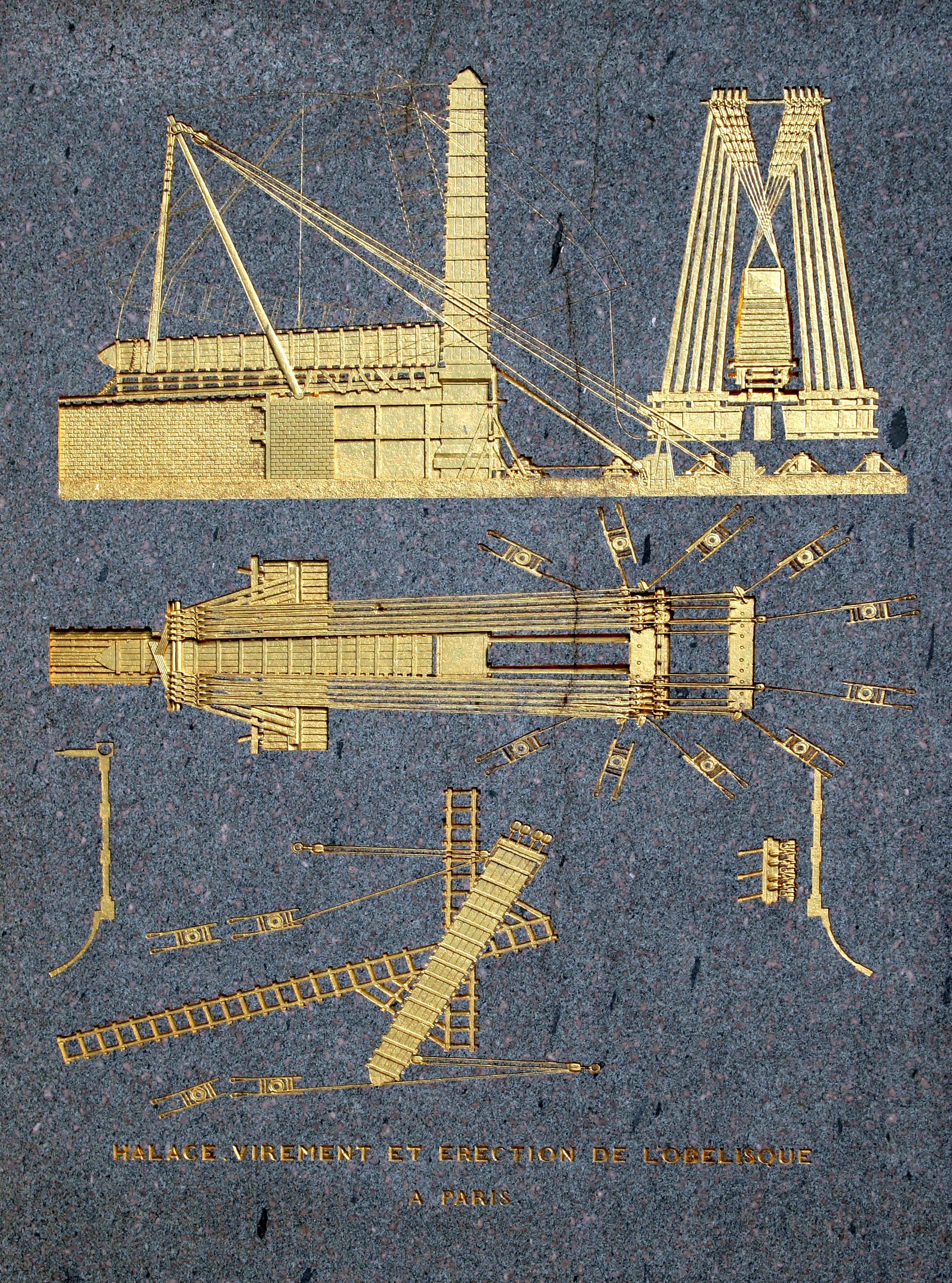 Détail de l'obélisque de la place de la Concorde à Paris